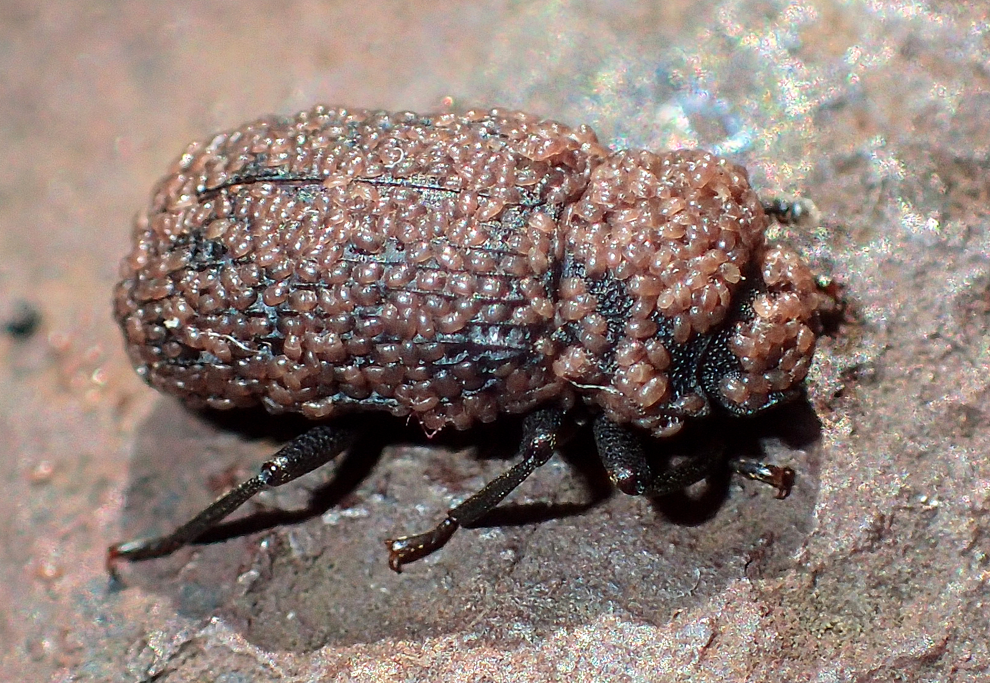 Bolitophagus reticulatus aus Griechenland, Epirus, unter der Rinde einer abgestorbenen Eiche, bedeckt mit Milben